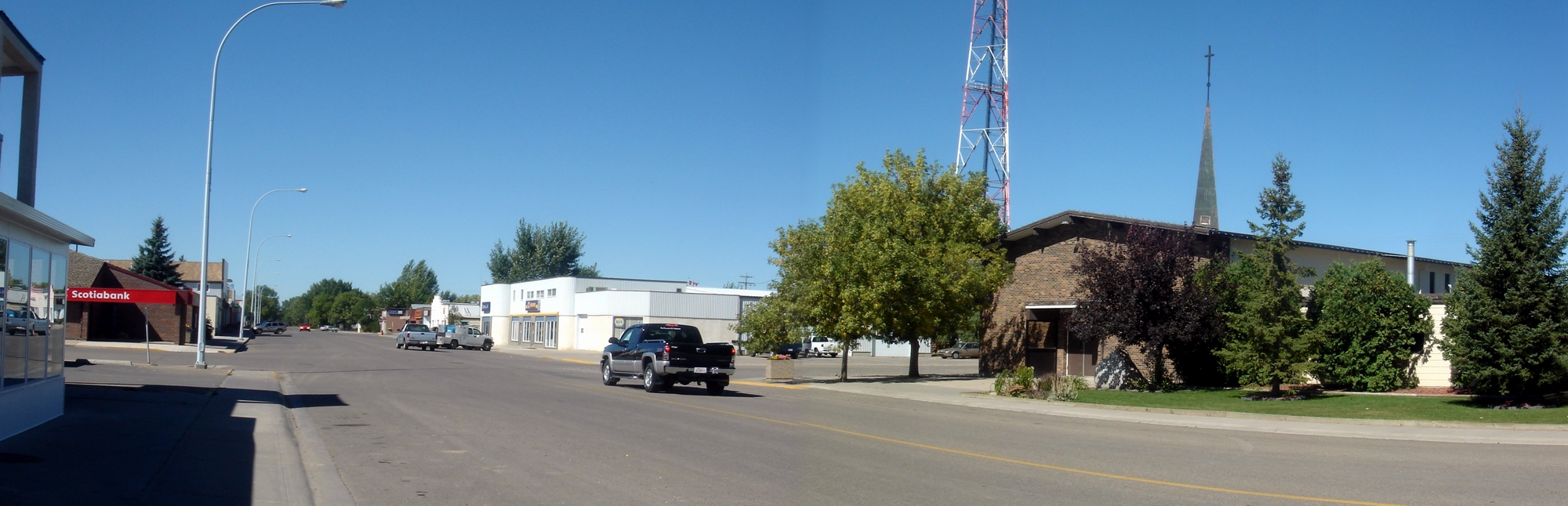 Main Street Vauxhall, Alberta